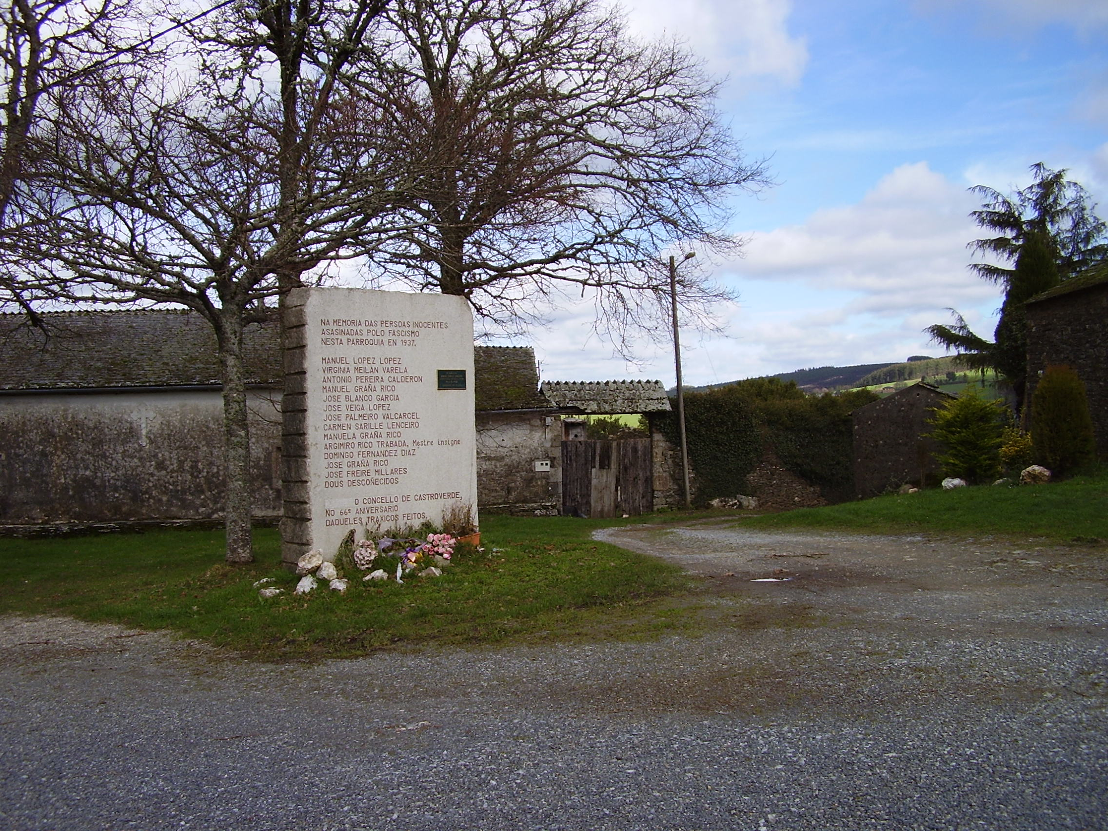 Praza parroquial de Montecubeiro.